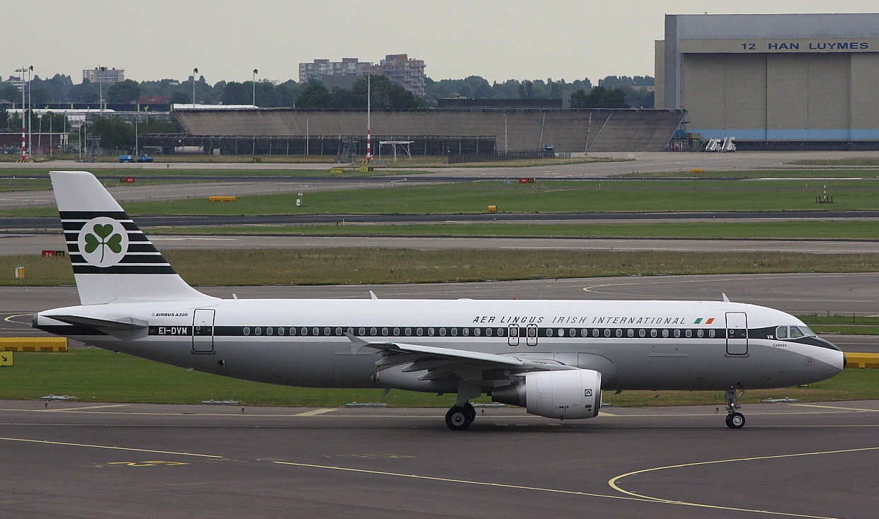 Aer Lingus A320 'retro' taxiing at Amsterdam Airport Schiphol